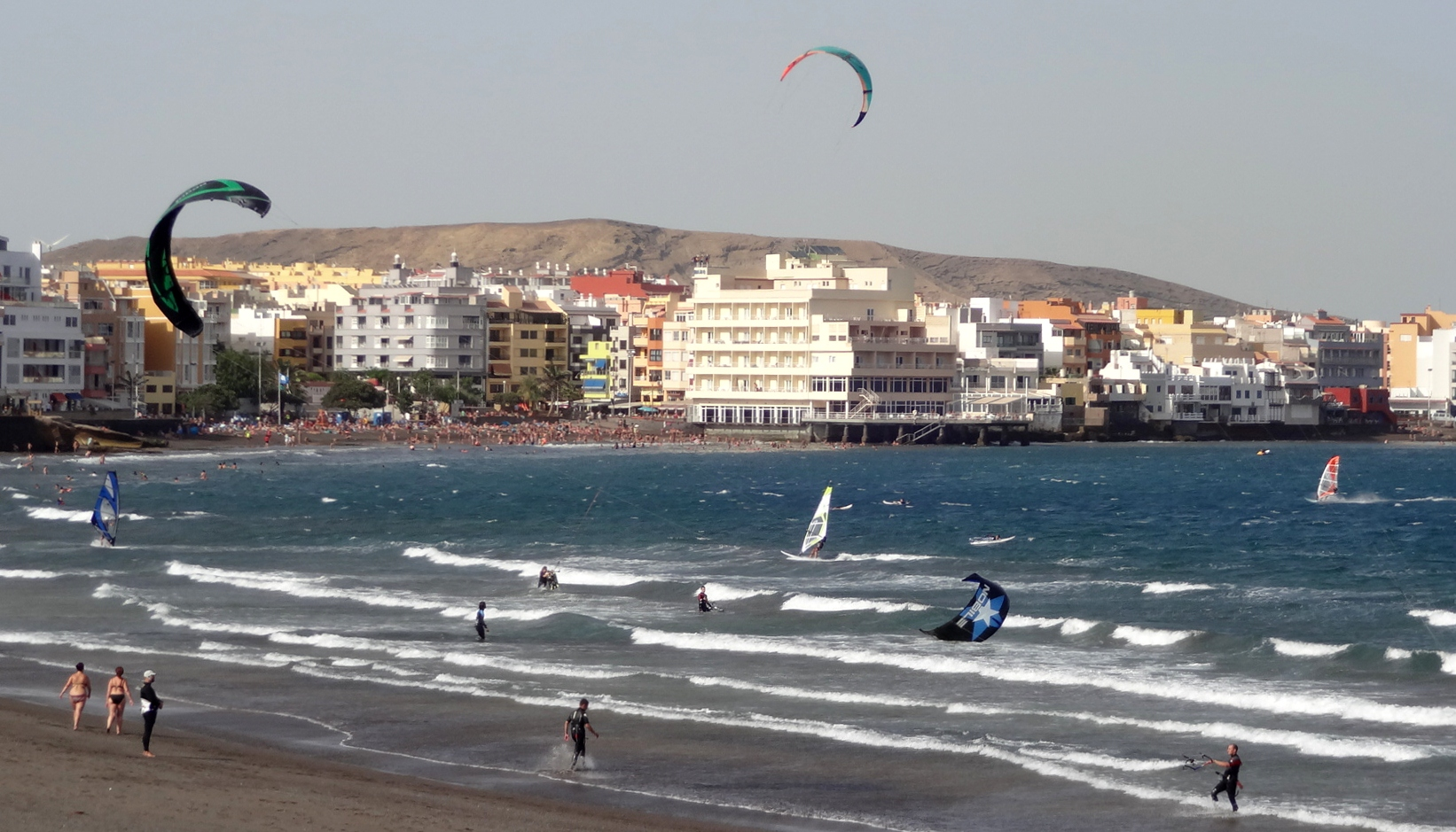 El Medano